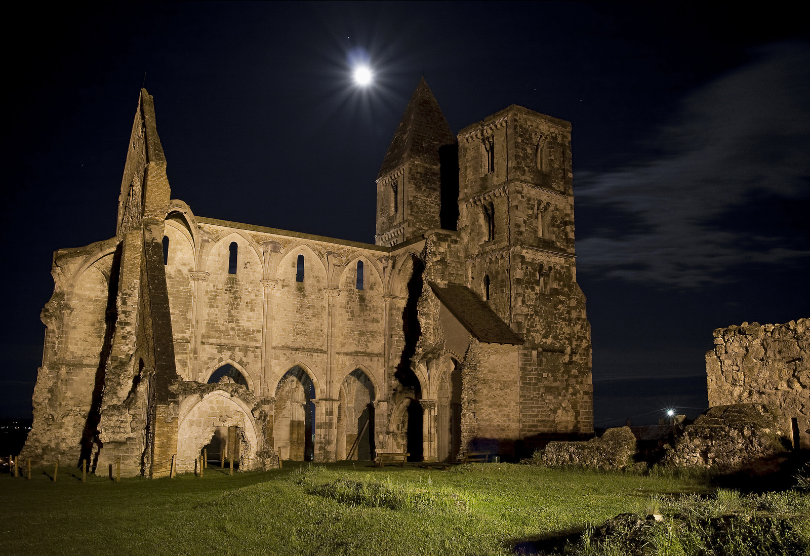 Premontrei prépostsági templom romja (Zsámbék, Régi templom u.) This is a photo of a monument in Hungary, Identifier: 7623